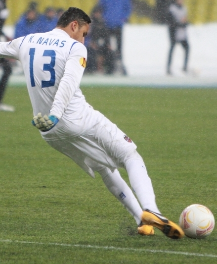 Кейлор Навас игрок ФК Леванте